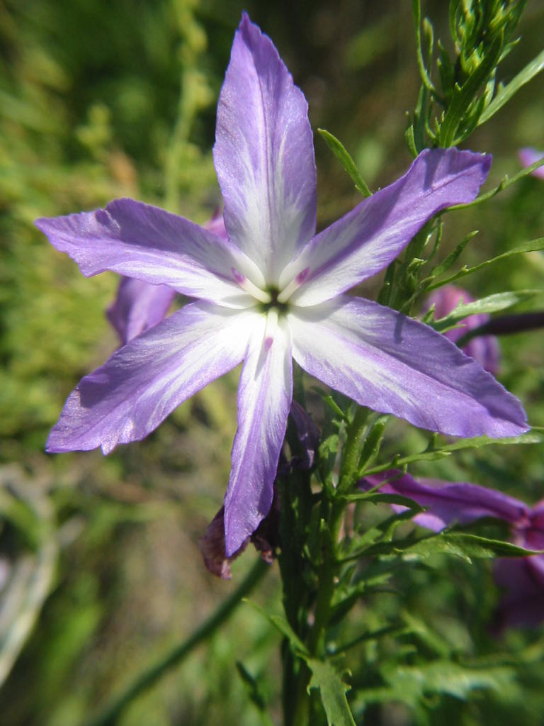 Leucocoryne coquimbensis, Los Vilos